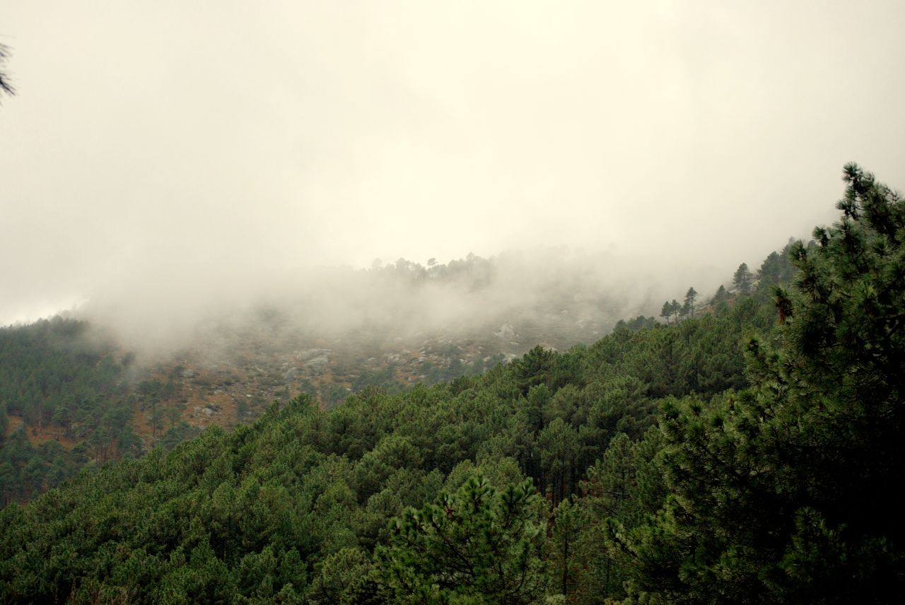 Monte nº 10. Sierra de Gredos, Ávila.